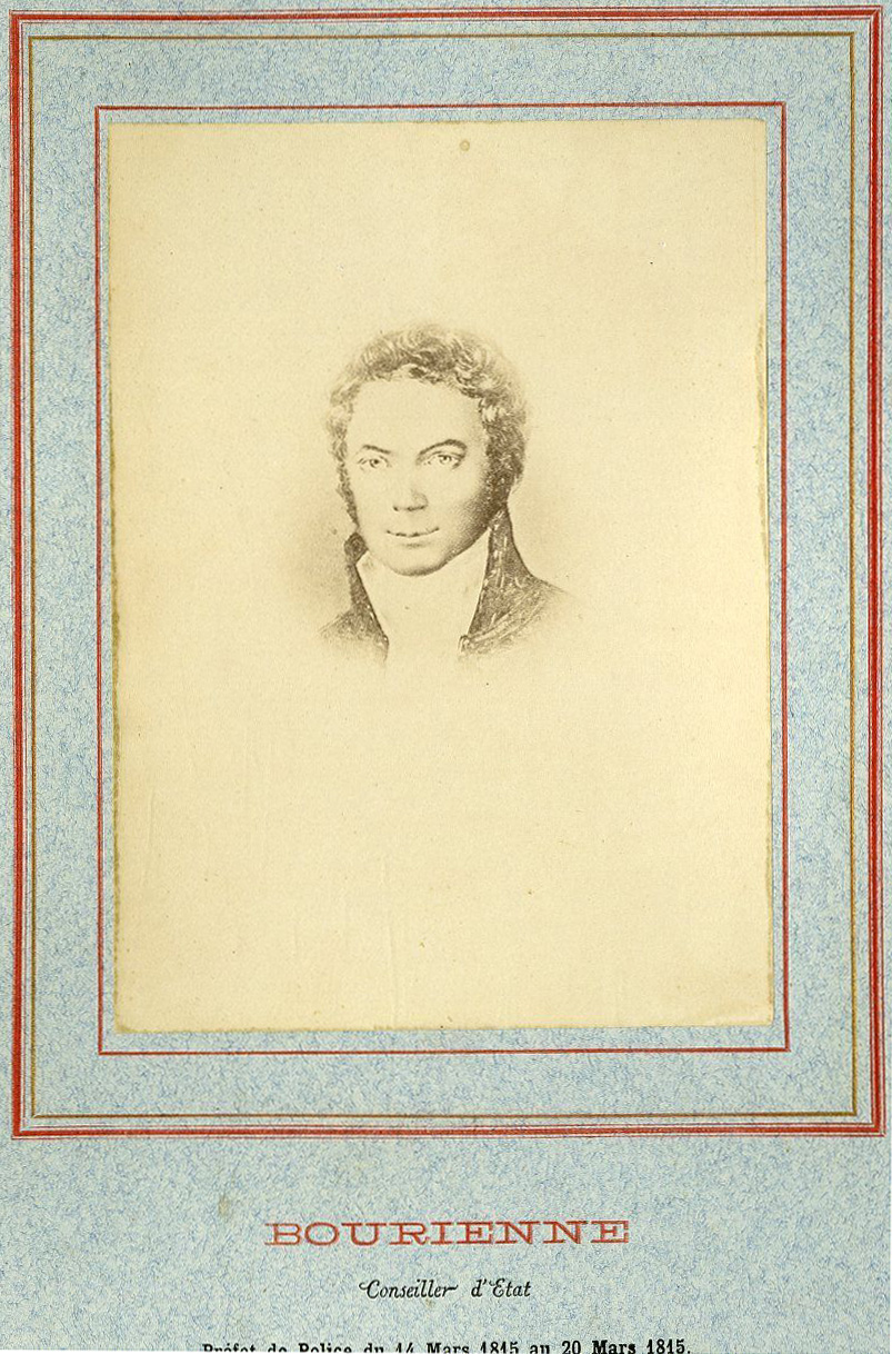 Louis Bourrienne, préfet de police.